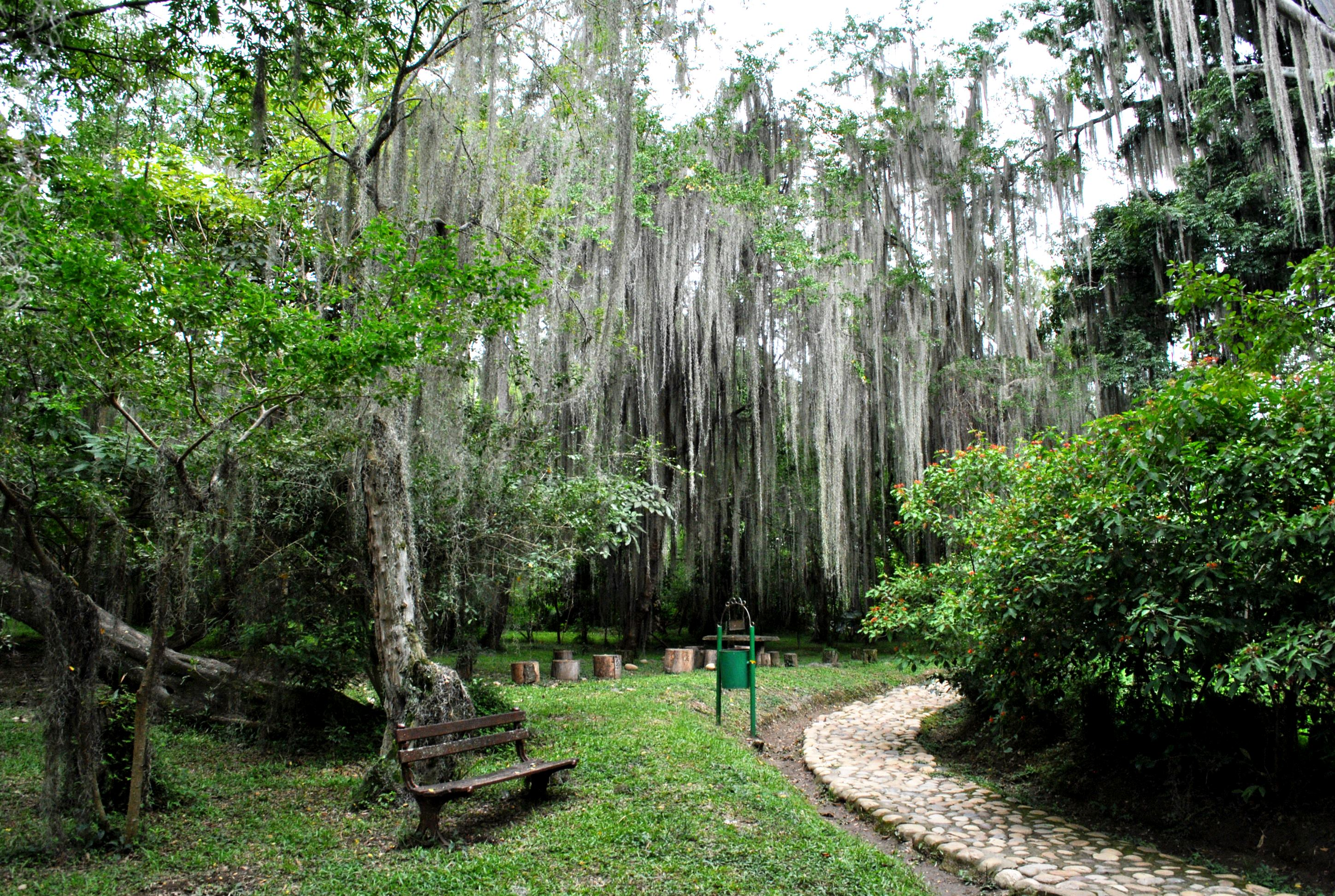 The Gallineral National Park in San Gil Colombia